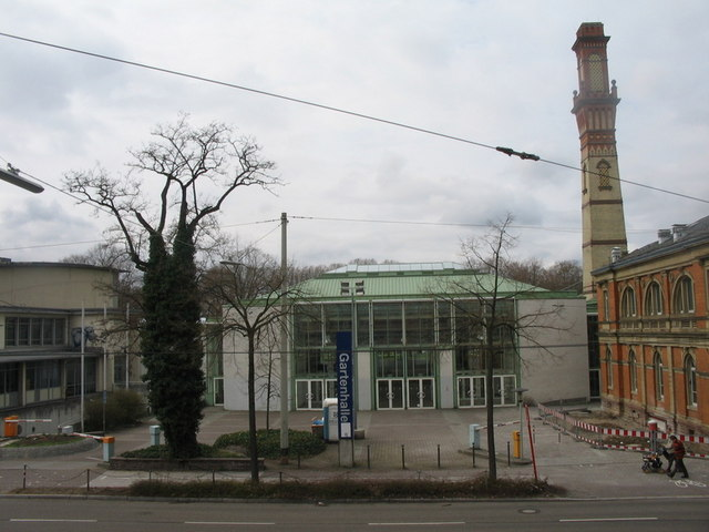 Gartenhalle und Schornstein des Vierordtbades